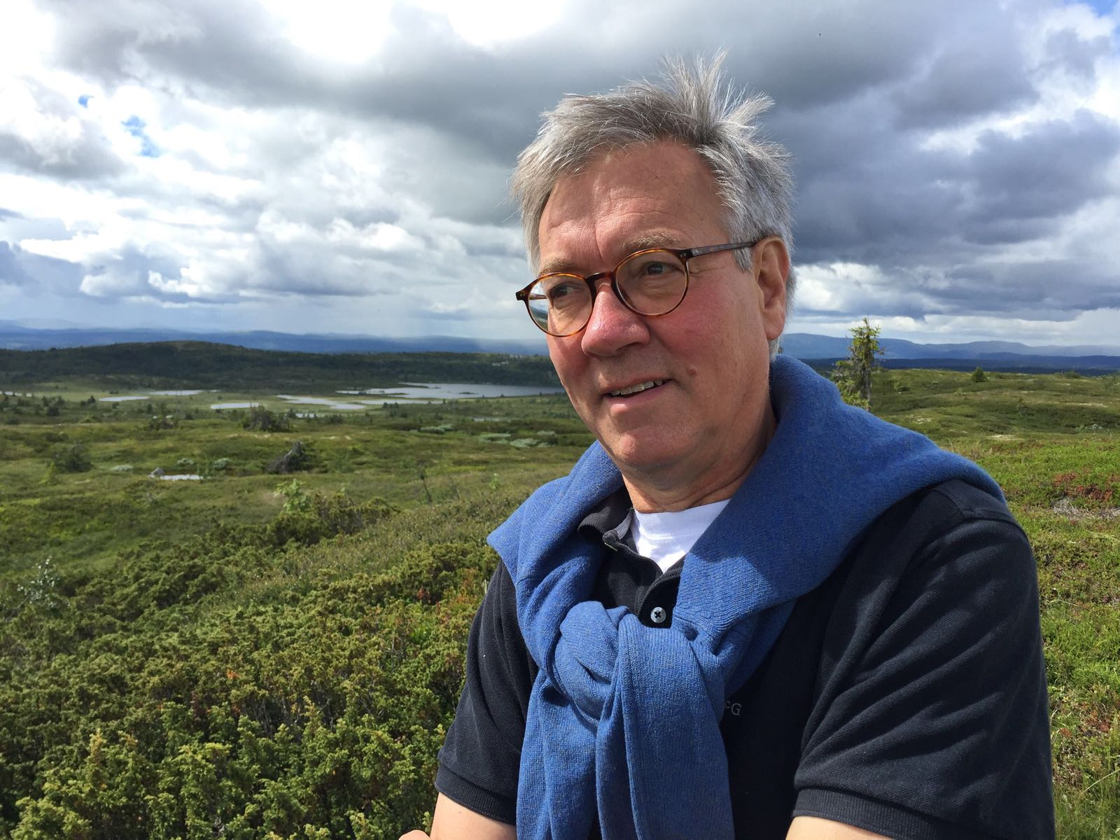 Scenarioschrijver en filmregisseur